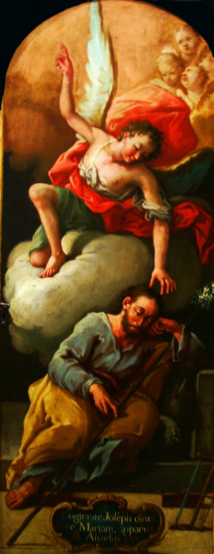 La obra representa el momento en San José fue avisado en sueños para que huyera a Egipto y salvara así al Niño Jesús de ser asesinado por el rey Herodes el Grande.